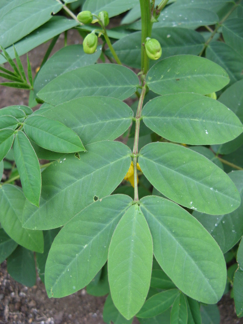 Senna occidentalis(Leaves)